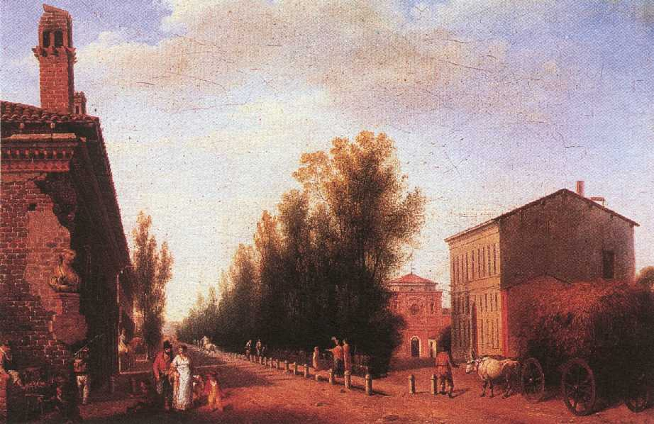 Strada per Monza, appena fuori Porta Venezia (Milano) a sinistra il Lazzaretto a destra la Chiesa di Santa Francesca Romana